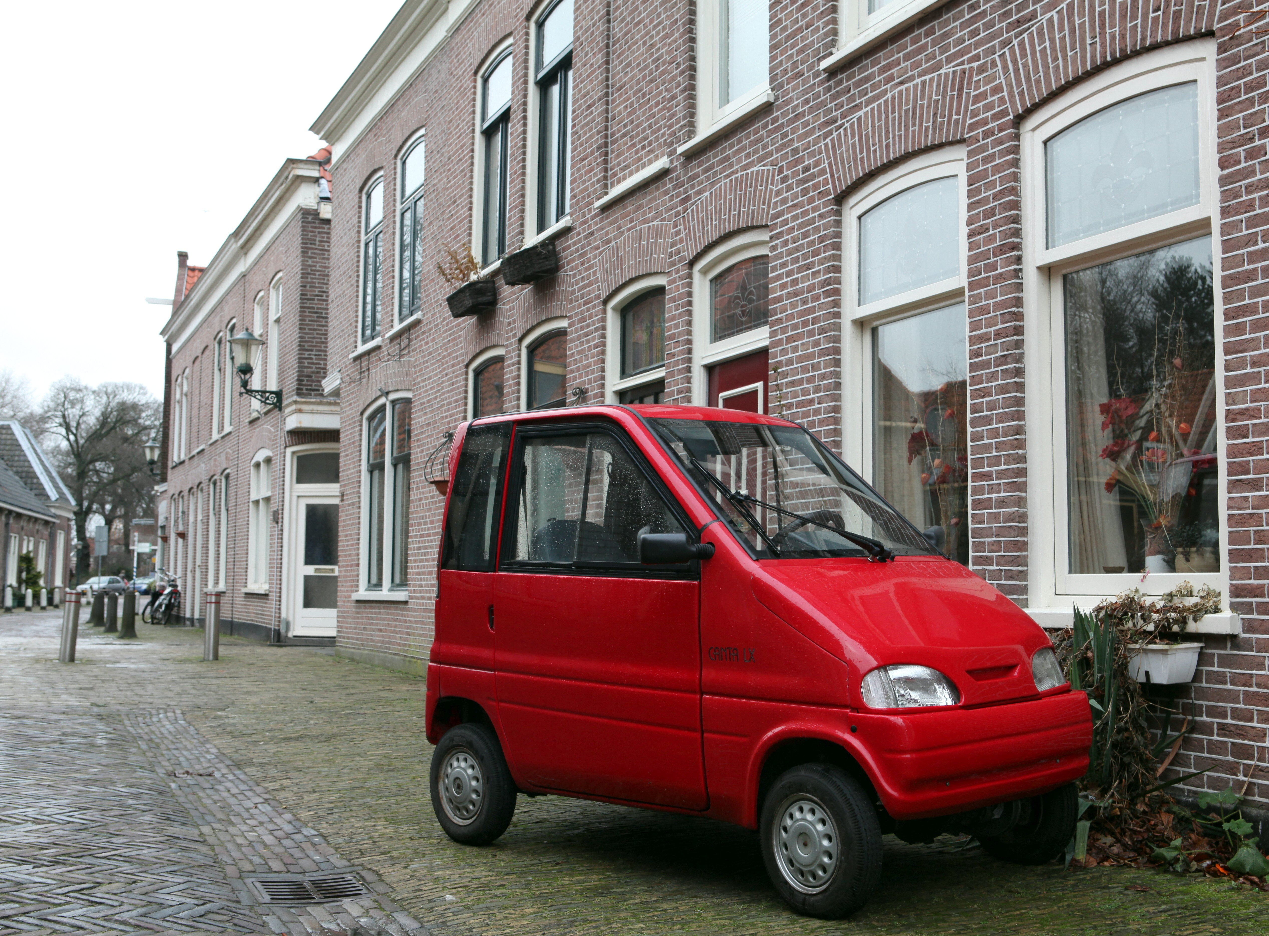 Canta LX in Alkmaar, Geest